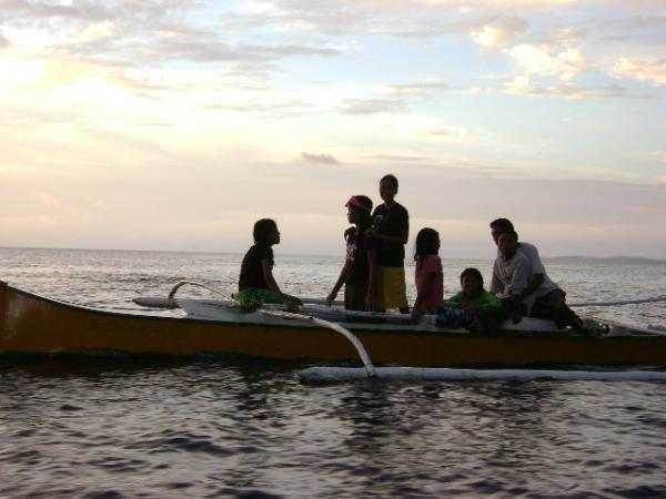 Magsaysay